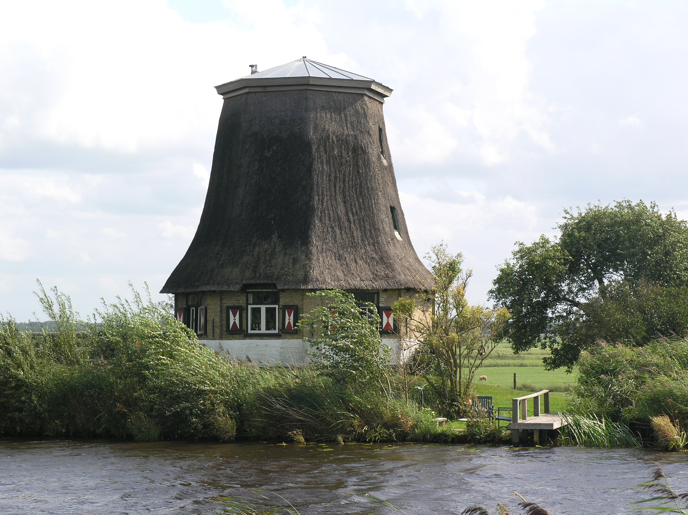 Tijnje Uilesprong molenromp